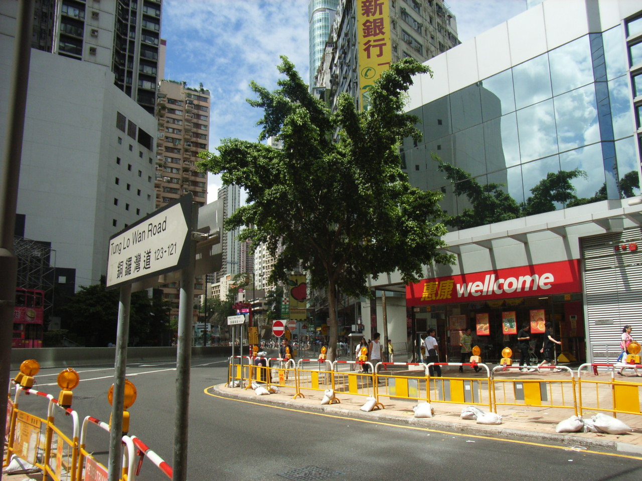 銅鑼灣道, Tung Lo Wan Road, Causeway Bay, Hong Kong Author: BEVERLYSHEN